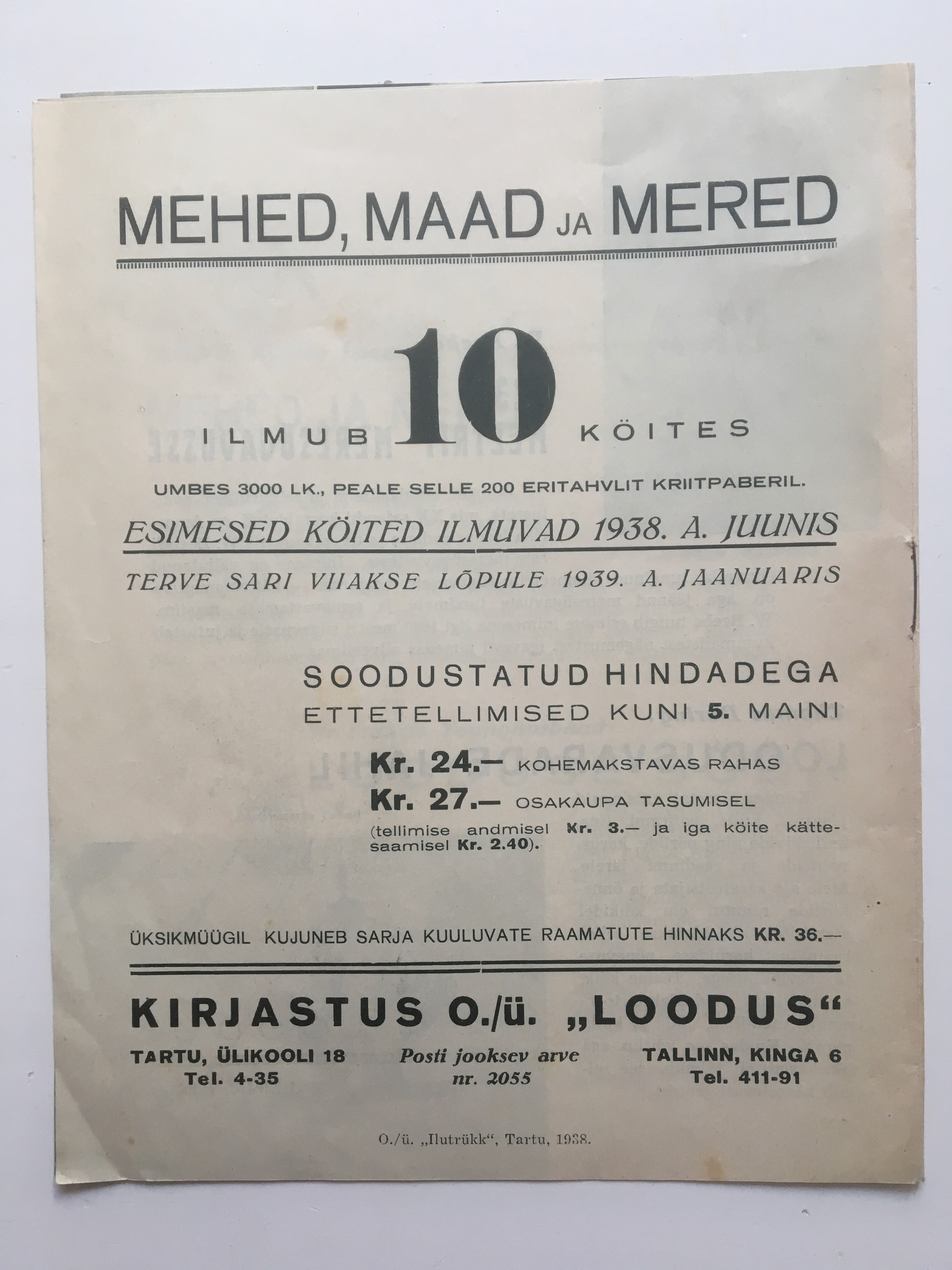 1 jaoks reklaamtrükis